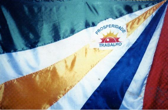 Foto da bandeira de Amarante do Maranhão